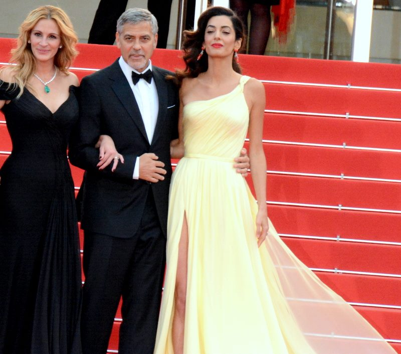 Présentation de "Money Monster" au festival de Cannes